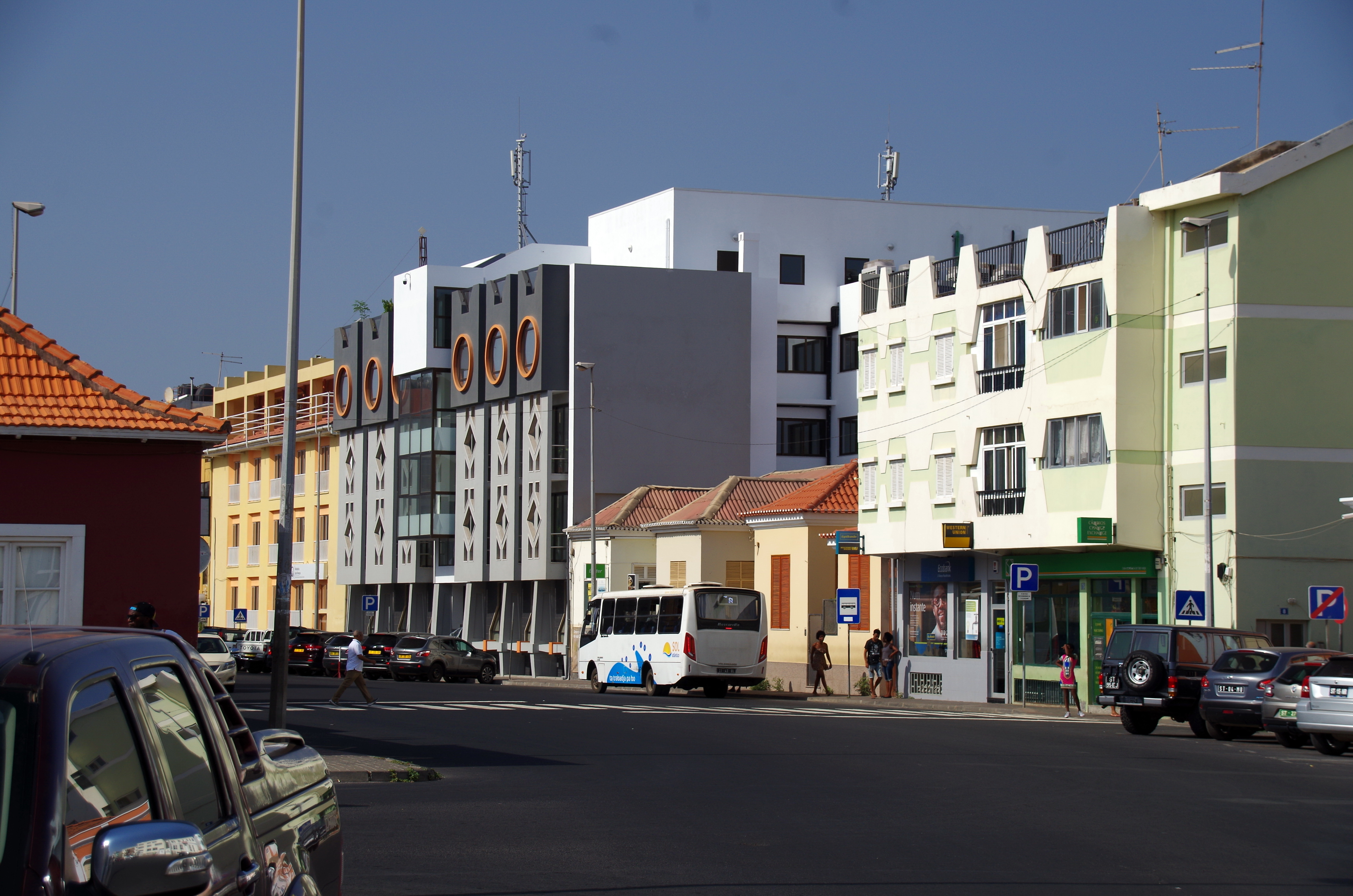 In der Avenida Cabral, Praia